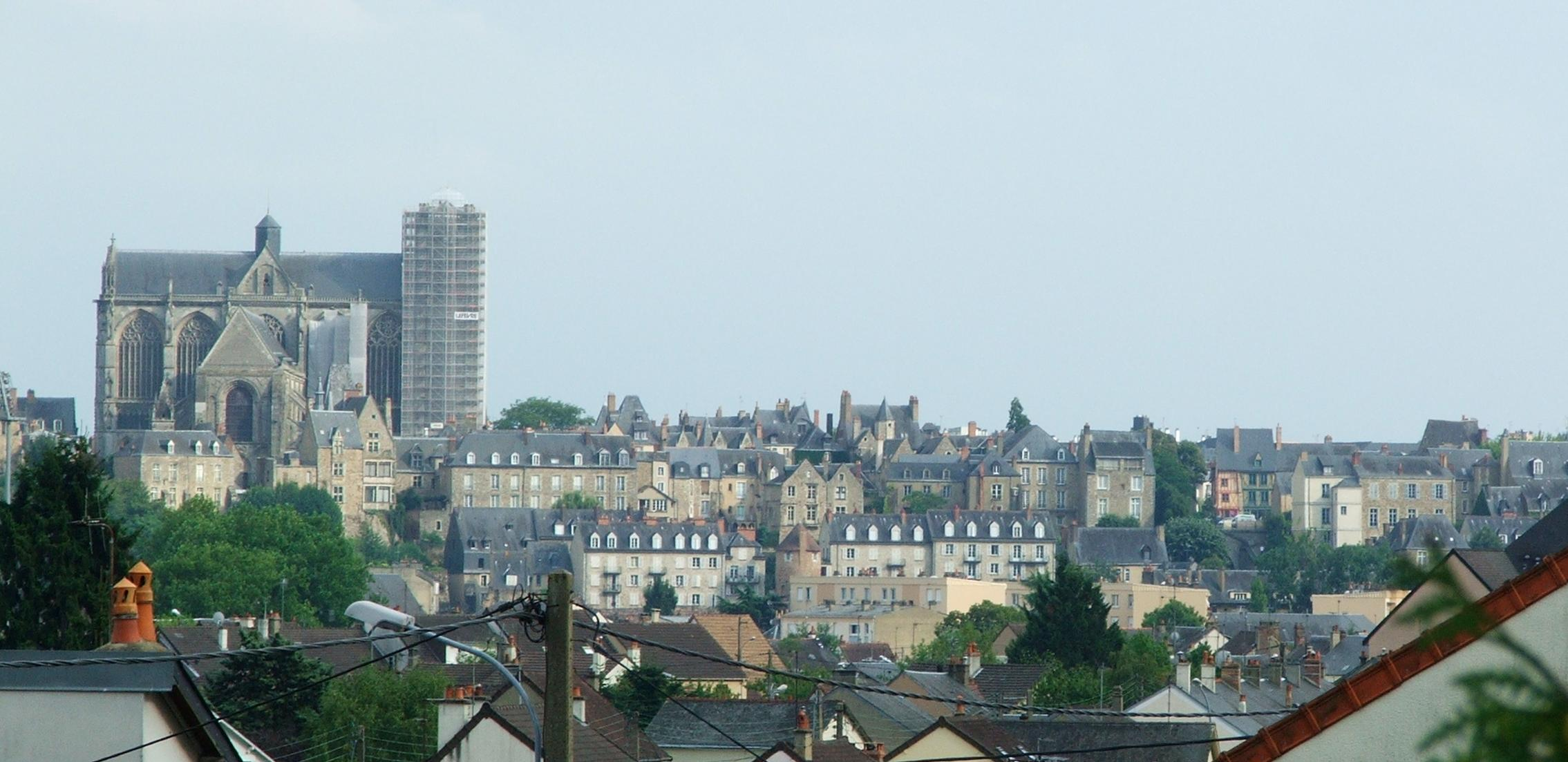 Vue du vieux Mans depuis les hauteurs de la Madeleine, non loin de la Chasse Royale au nord du Mans.